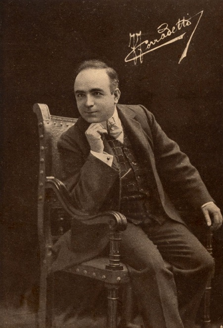 Ferruccio Corradetti